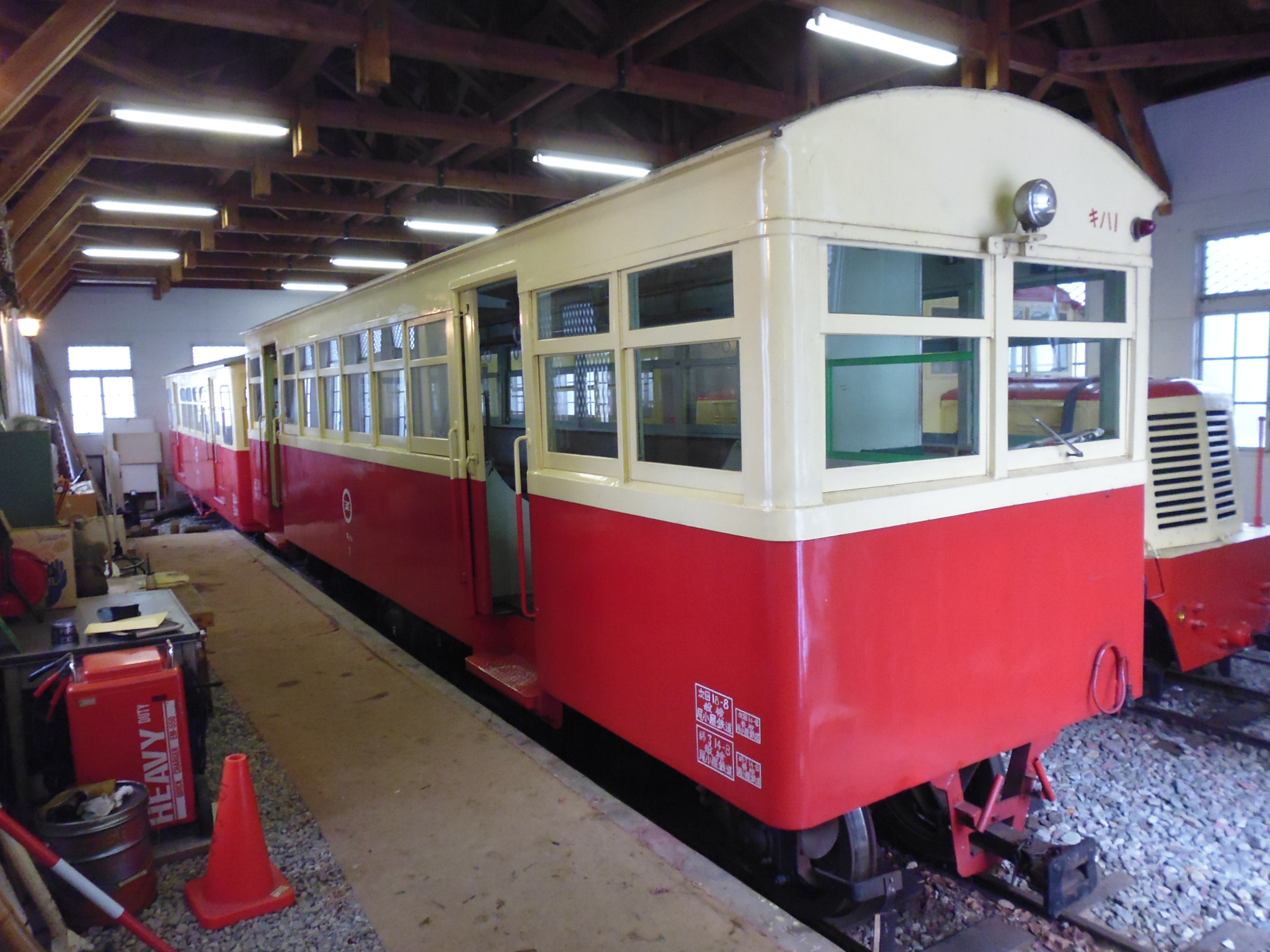 尾小屋鉄道の気動車キハ1。